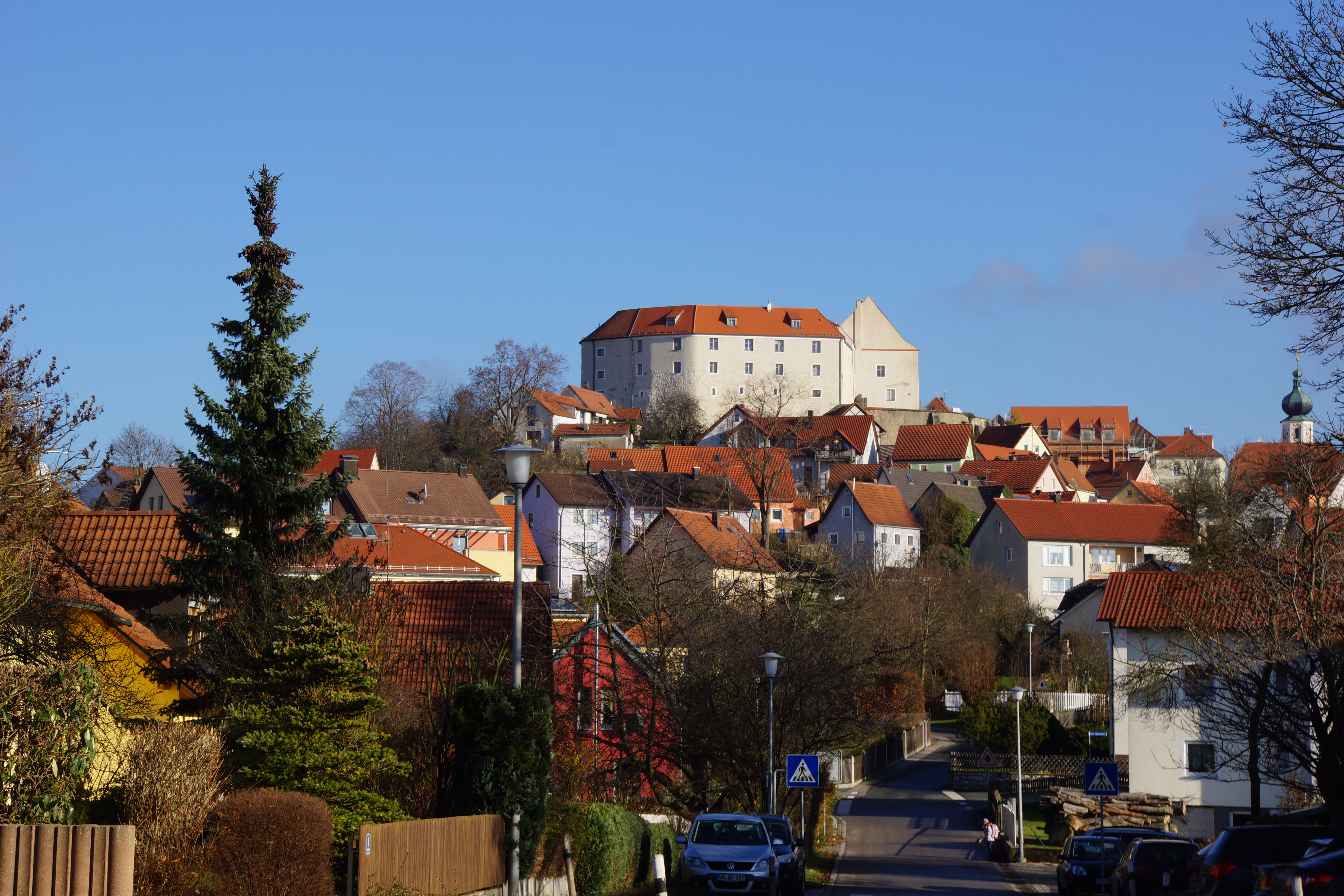 Markt Lupburg in der Oberpfalz / Landkreis Neumarkt